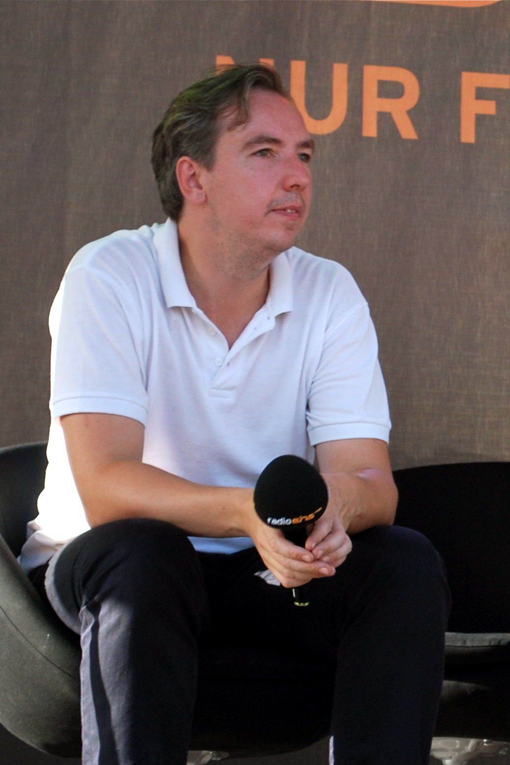 Olli Schulz: 15 Jahre RadioEins